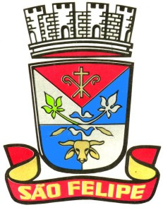 Brasão do Município de São Felipe Bahia